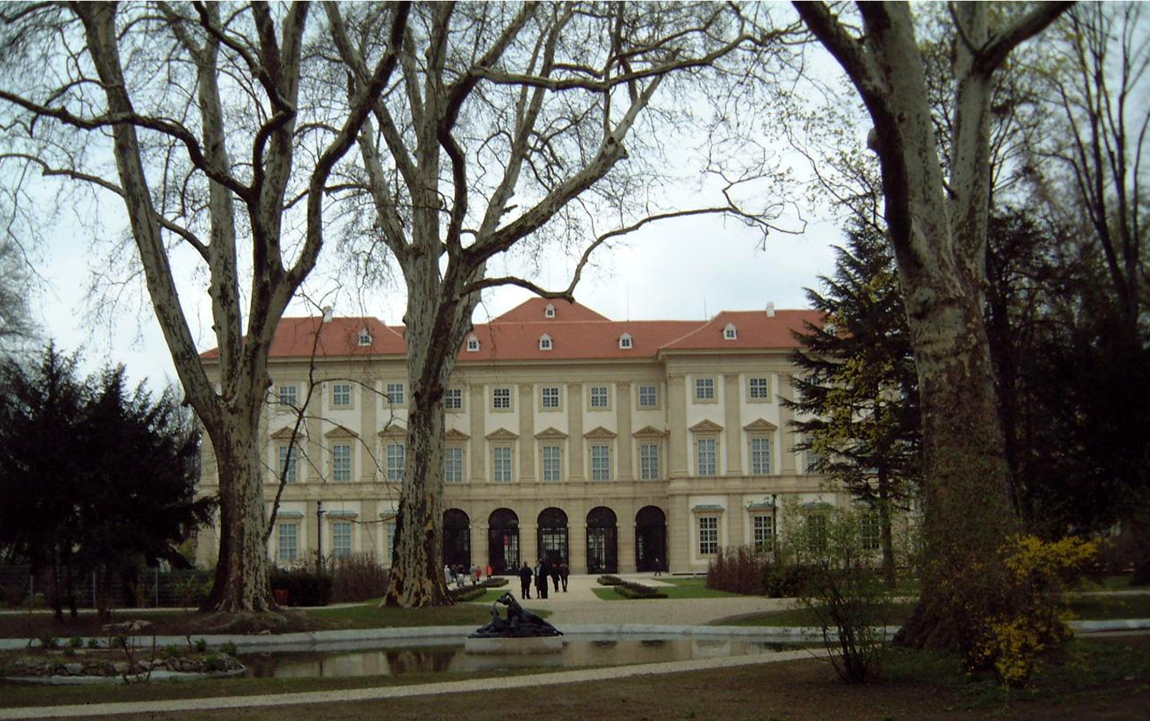 Liechtenstein Museum (15)